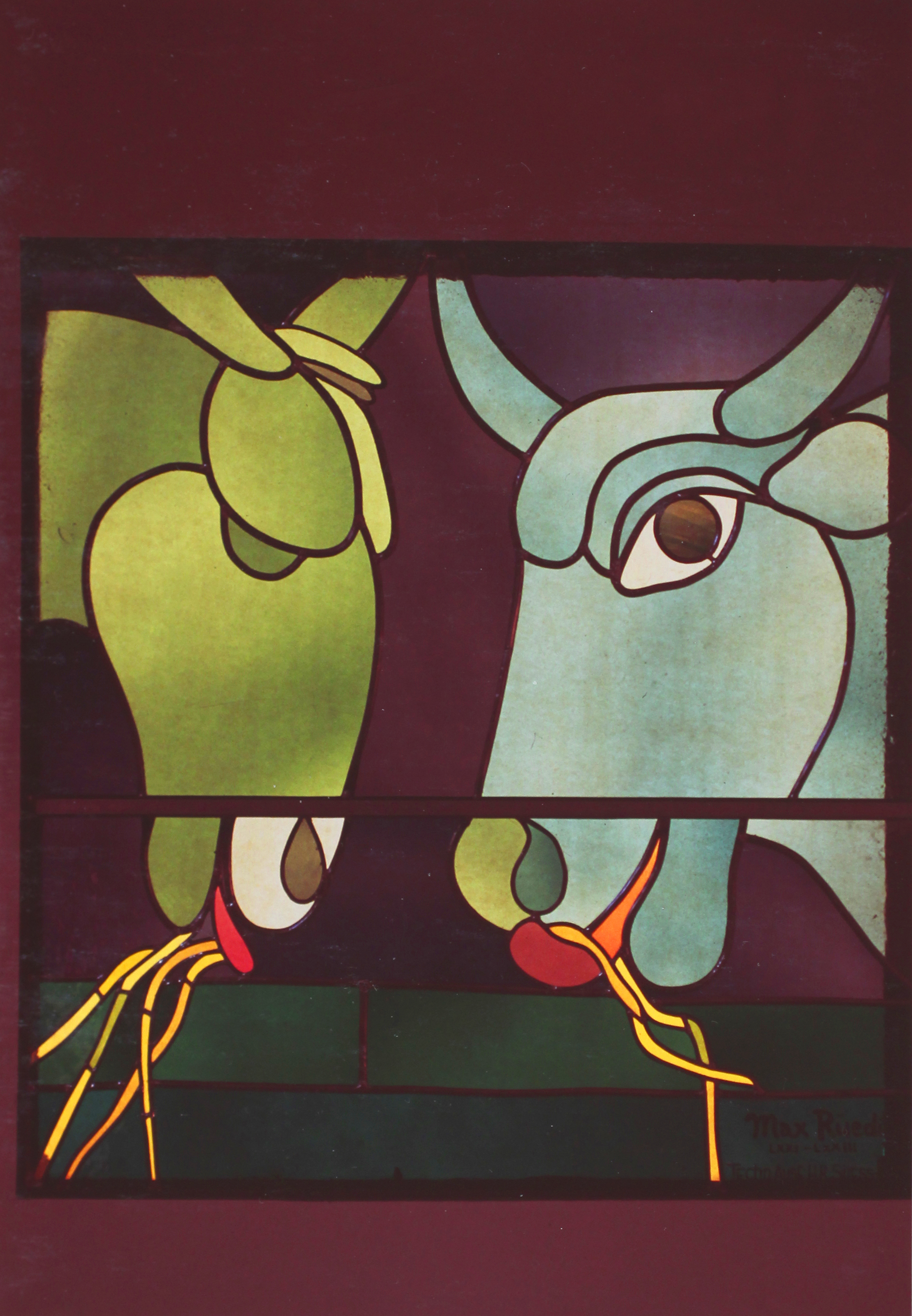 Römisch-katholische Pfarrkirche St. Franziskus Zürich-Wollishofen, Glasfenster von Max Rüedi